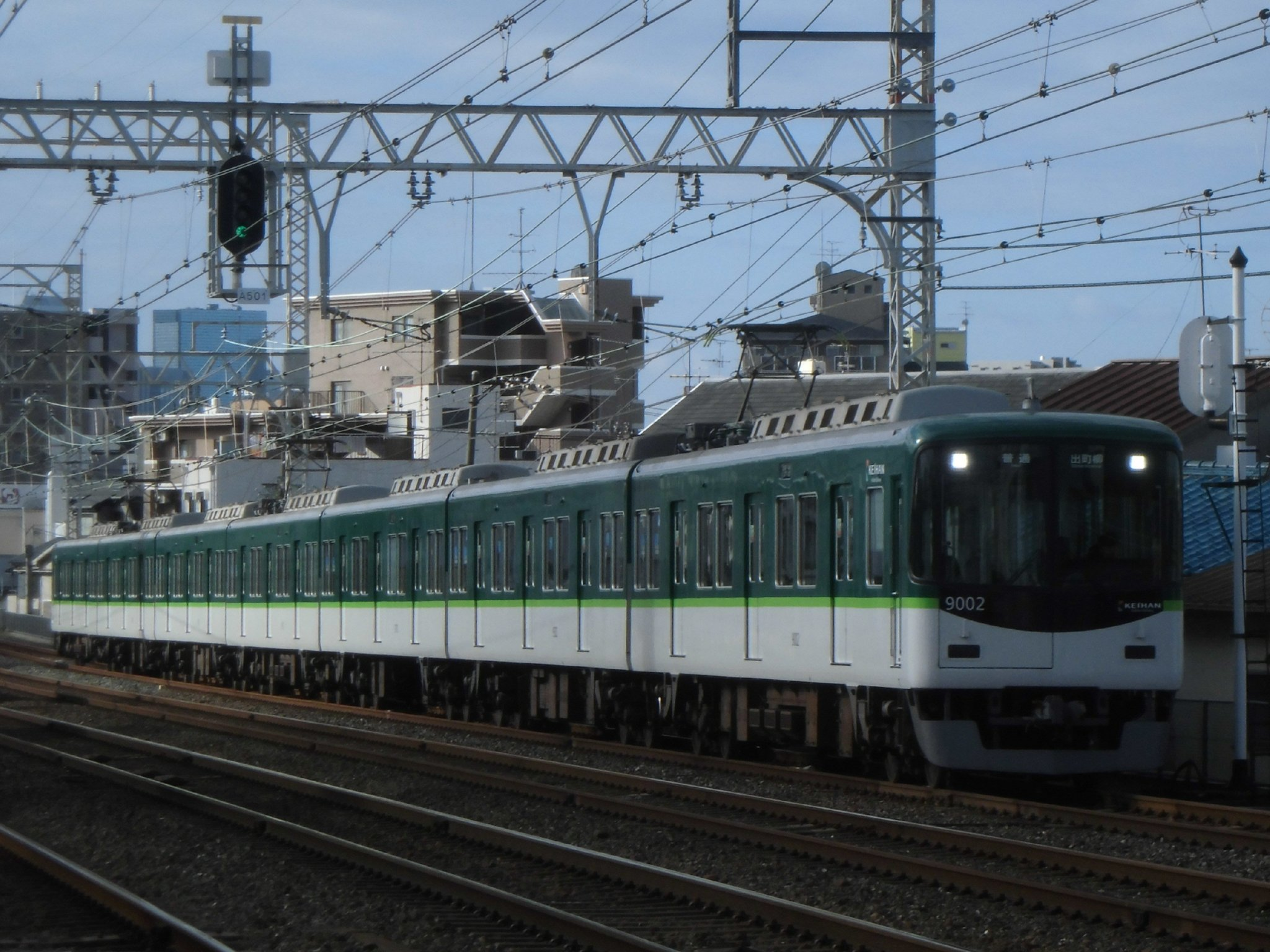 京阪9000系9002F